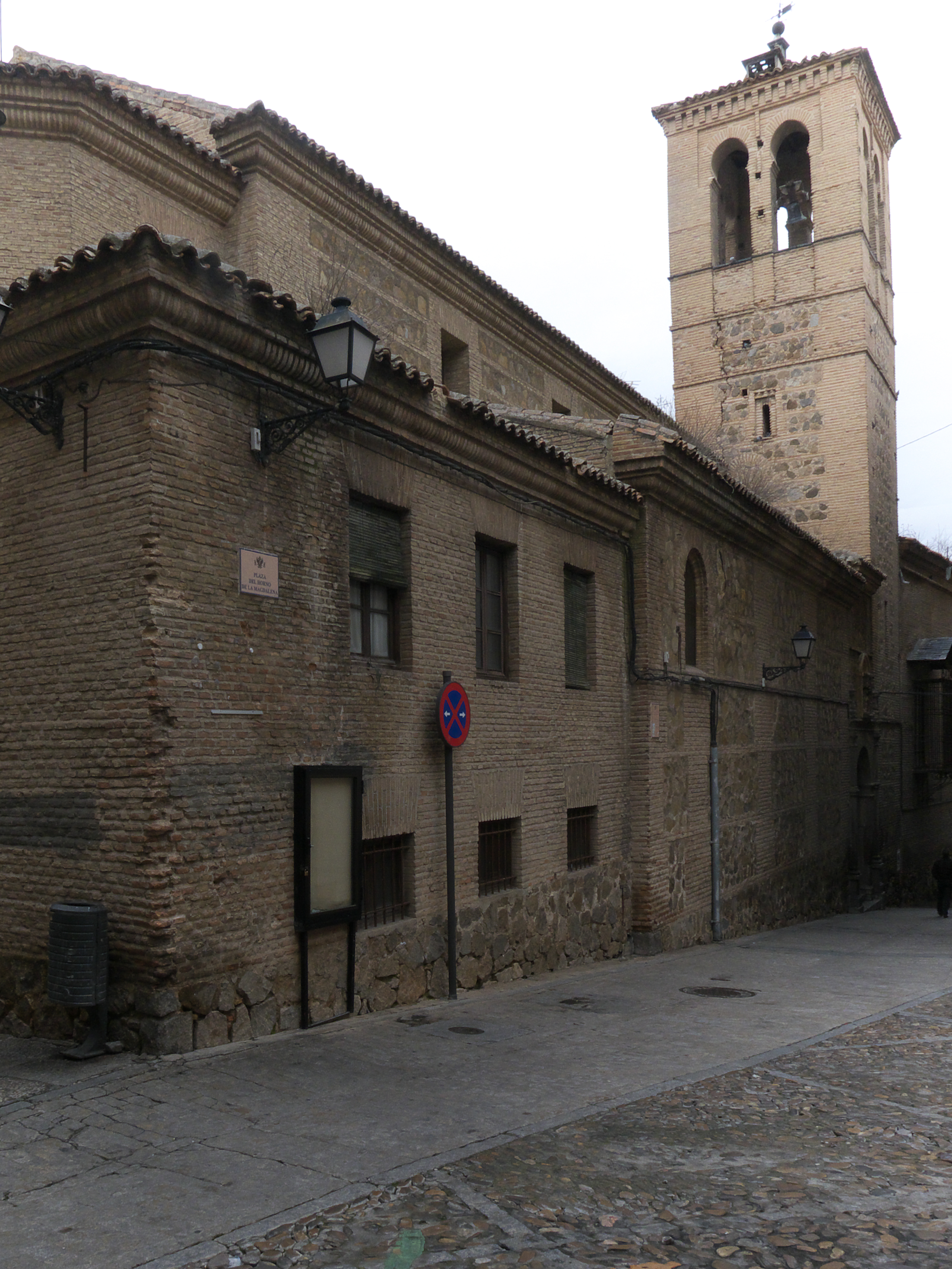 Incendiada en el año 1936, conserva un campanario del más puro arte mudéjar toledano.